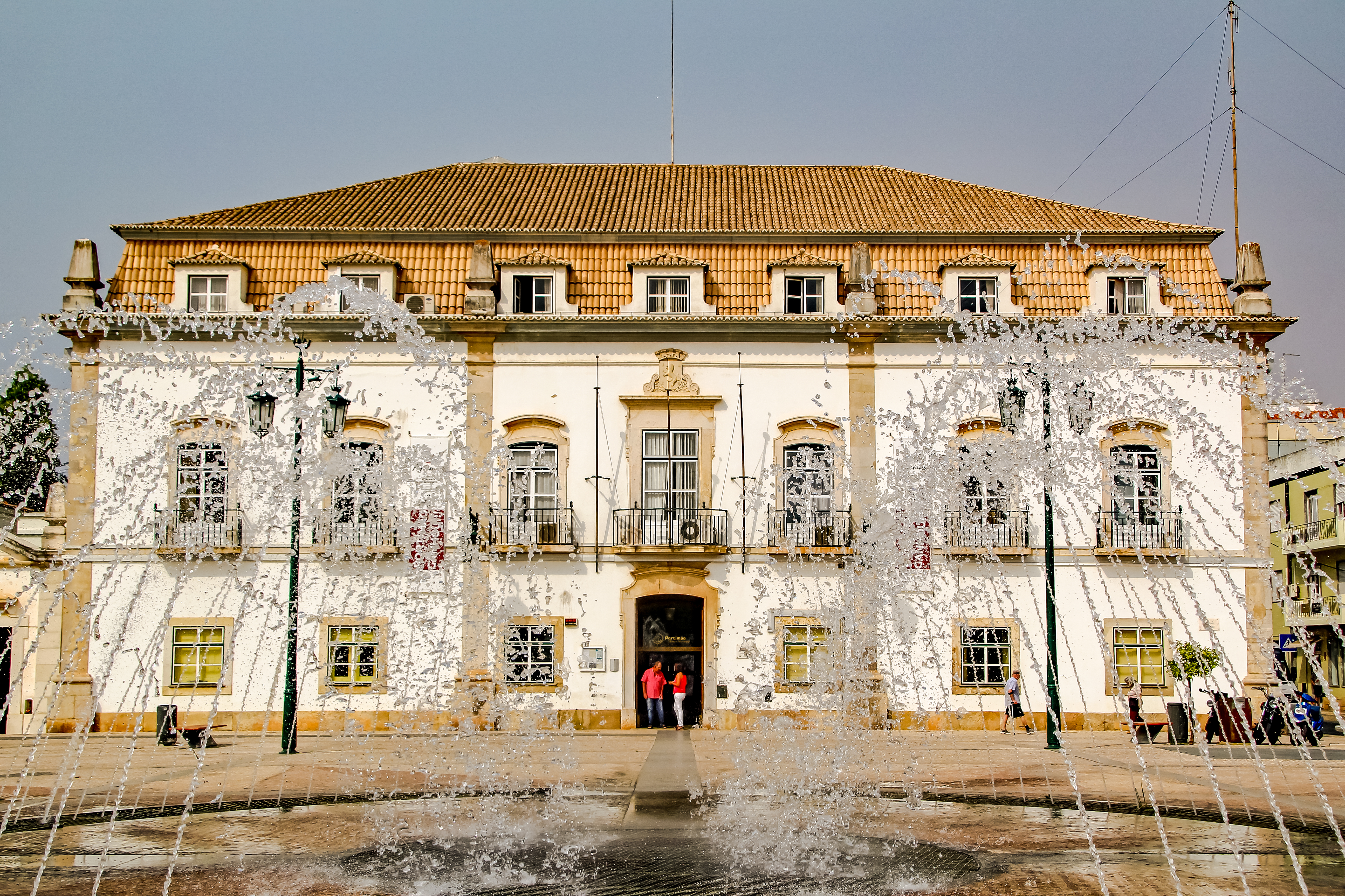 Portimao es una ciudad portuguesa del distrito de Faro, el región del Algarve.